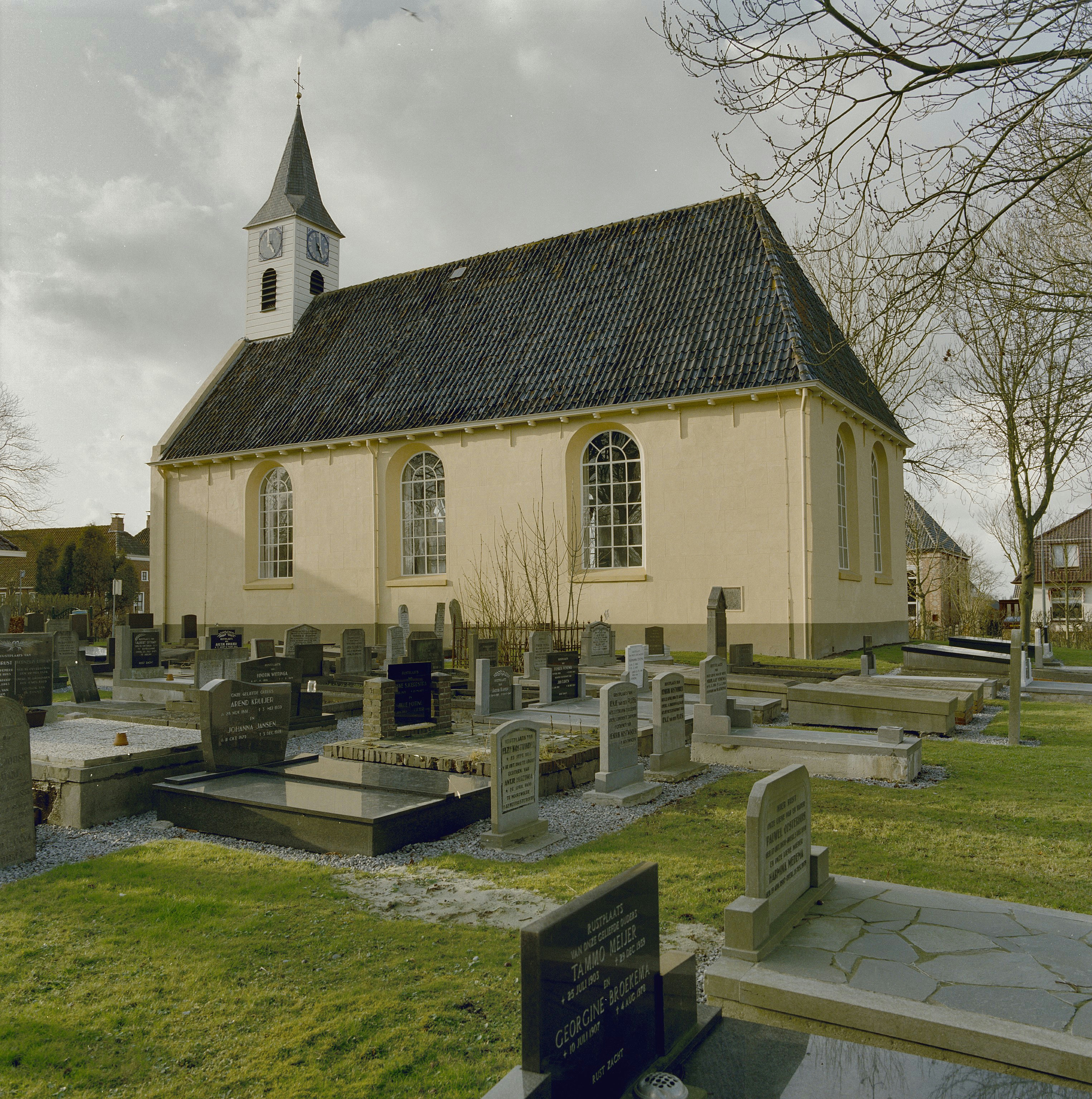 Nederlands Hervormde Kerk: Exterieur overzicht zuidgevel